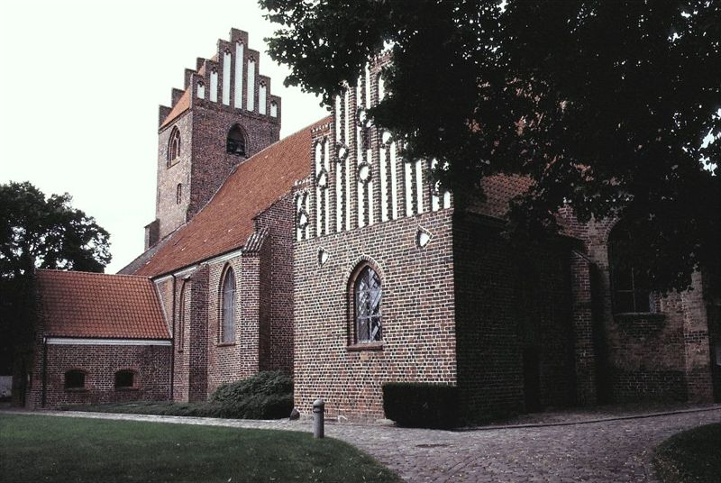 Vordingborg Vor Frue Kirke i Danmark. Vordingborg Vor Frue kirke